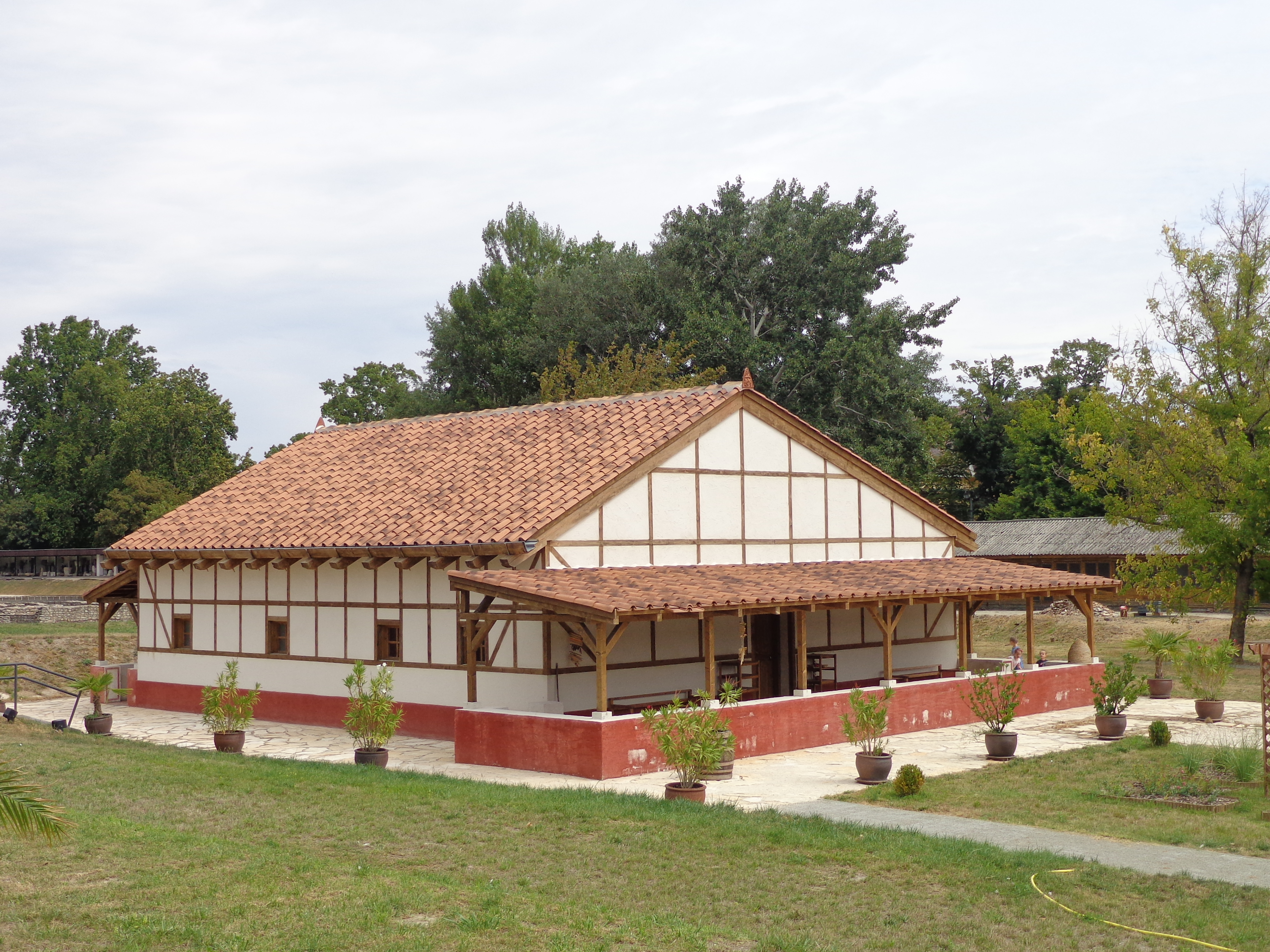 római polgárváros romegyüttese This is a photo of a monument in Hungary. Identifier: 392